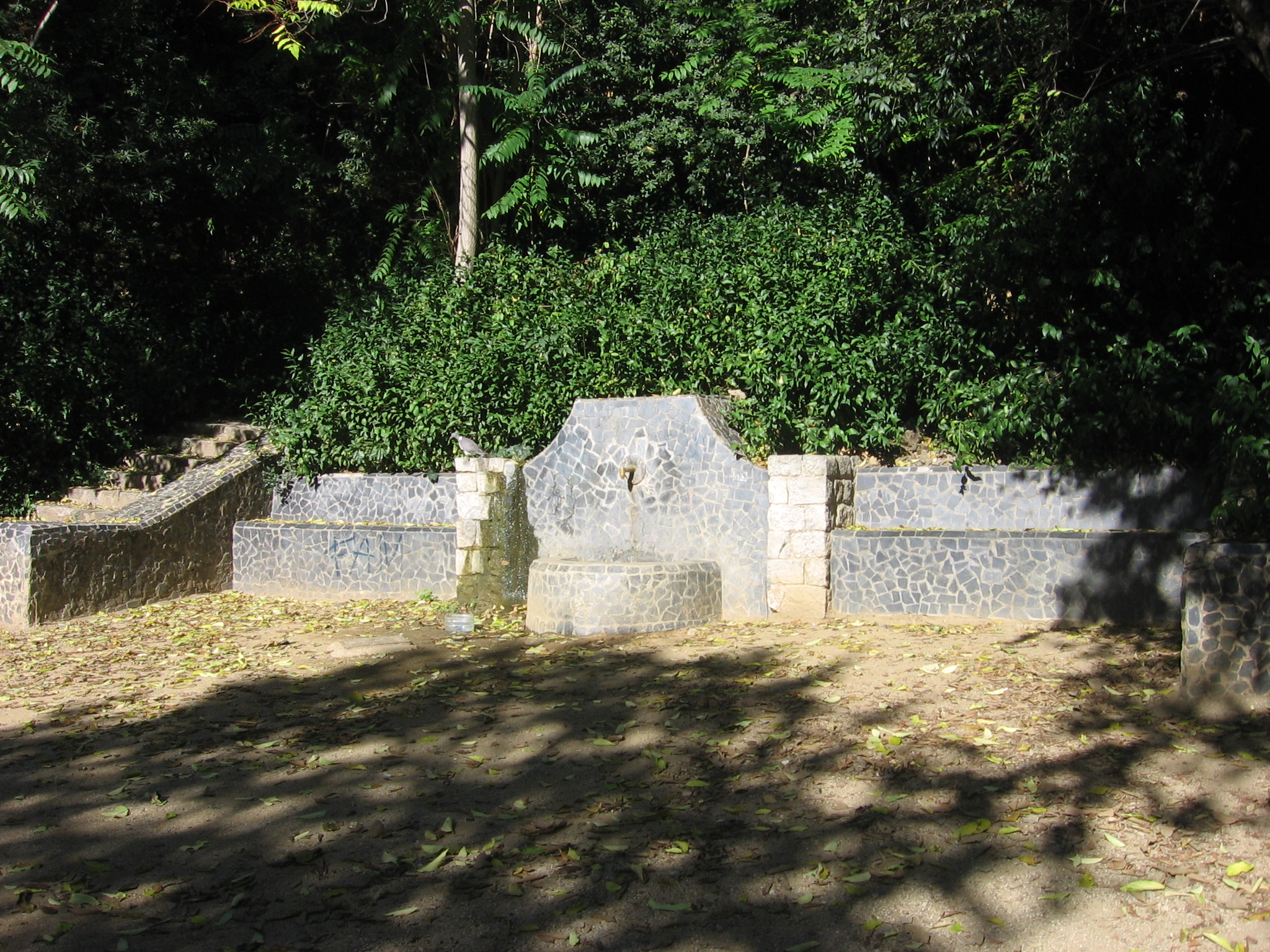 Parque de la Font del Racó.